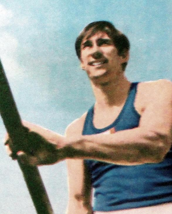 CAMPIONI DELLO SPORT 1968/69-n.36-HERVE D'ENCAUSSE-FRANCIA